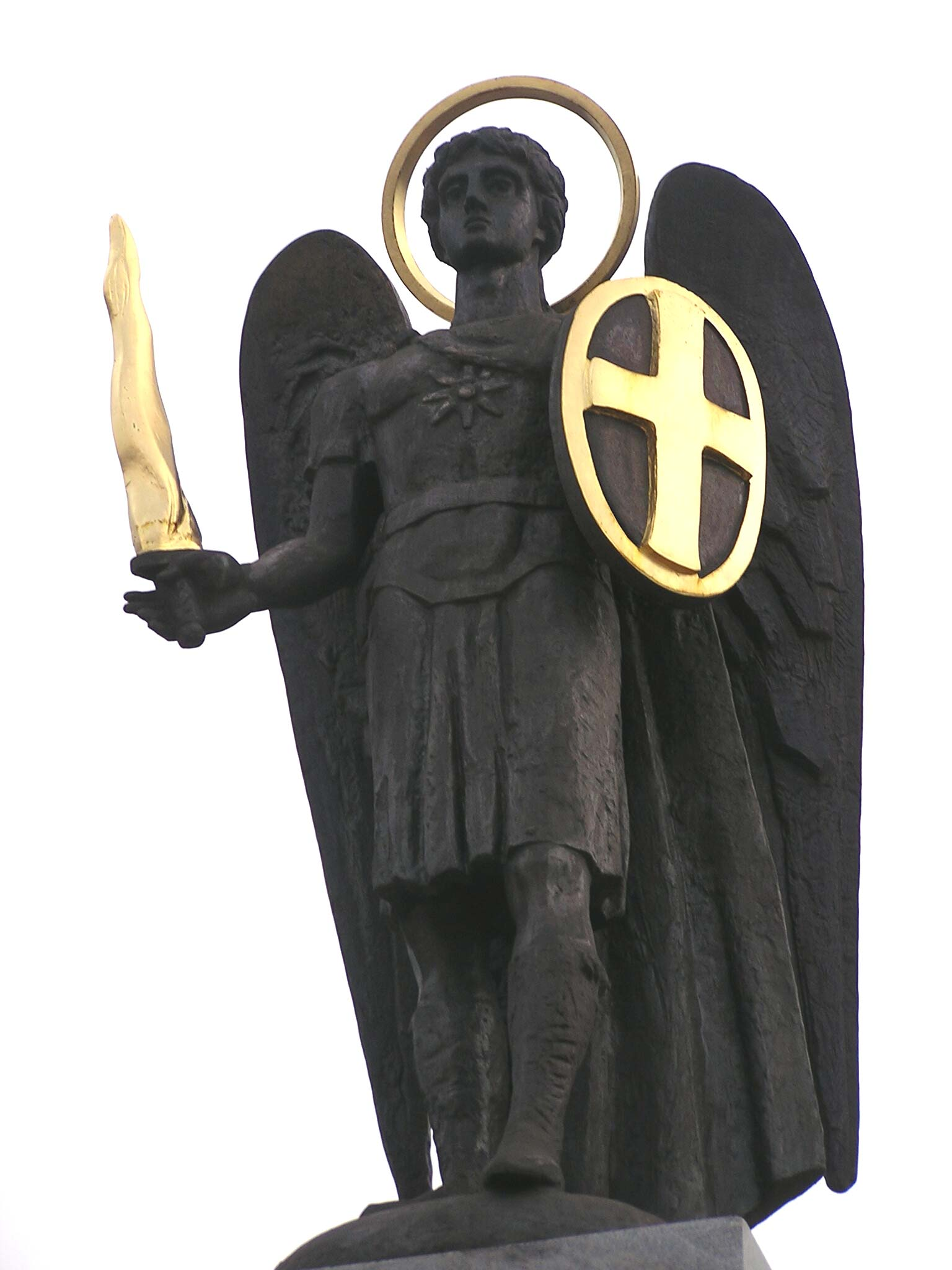 Свято-Преображенский кафедральный собор в Донецке, бронзовая статуя архангела Михаила Свято-Преображенский кафедральный собор